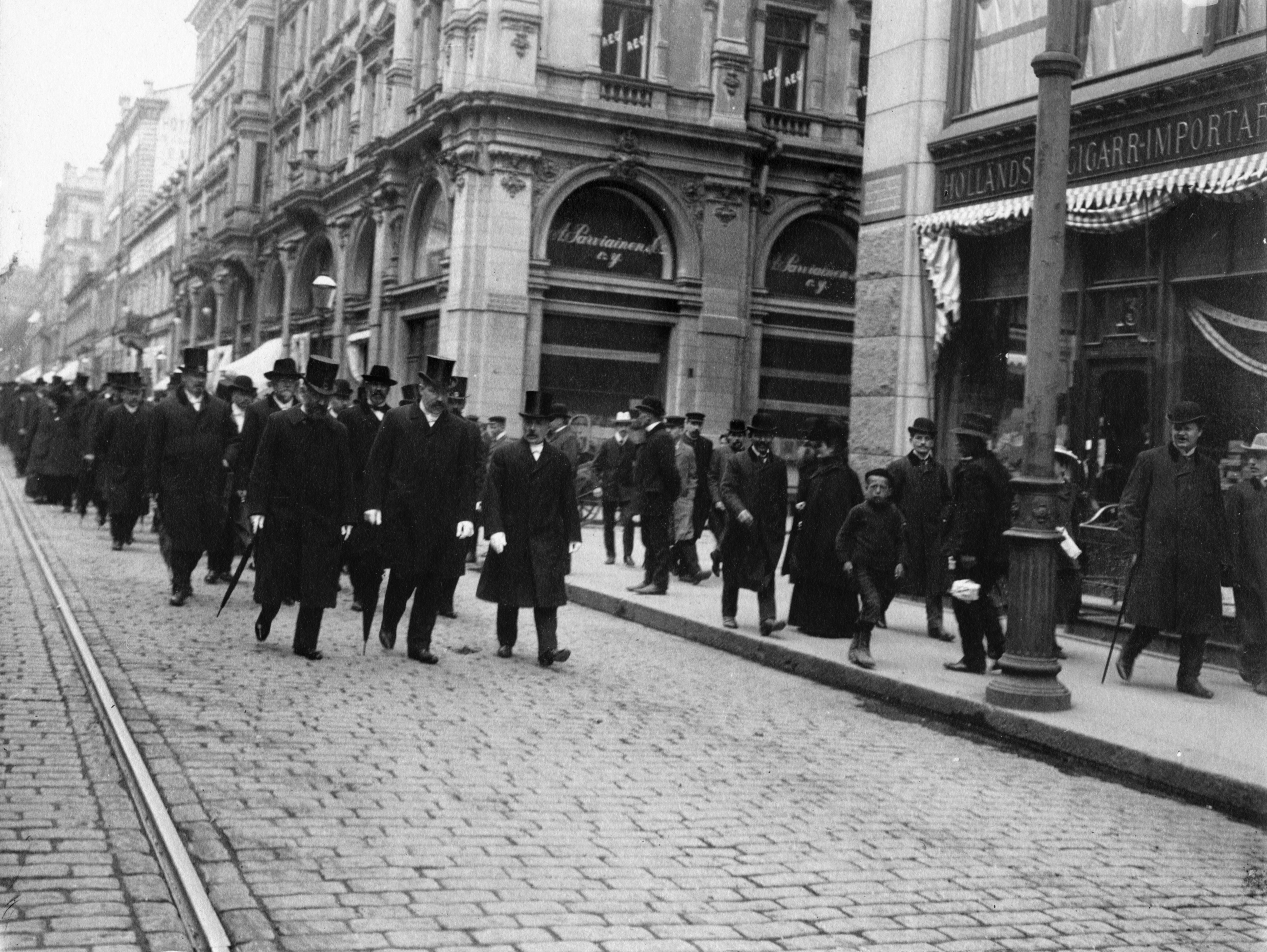 Ensimmäisten yksikamaristen valtiopäivien avajaiset 25.5.1907. Kansanedustajat Aleksanterinkadulla matkalla Palokunnantalolta Nikolainkirkkoon (Tuomiokirkko). Eturivissä puhemiehet N.R. Ursin, P.E. Svinhufvud ja E.G. Palmén. -- repronegatiivi ja vedos, lasi paperi, mv